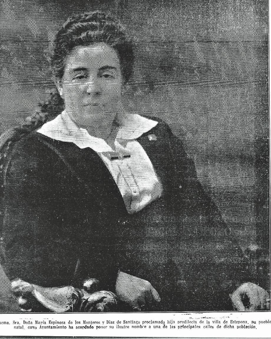 María Espinosa de los Monteros. Activista en la lucha por los derechos de las mujeres en España durante el primer tercio del s.XX